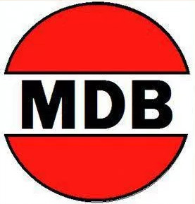 Logo do Antigo Movimento Democrático Brasileiro